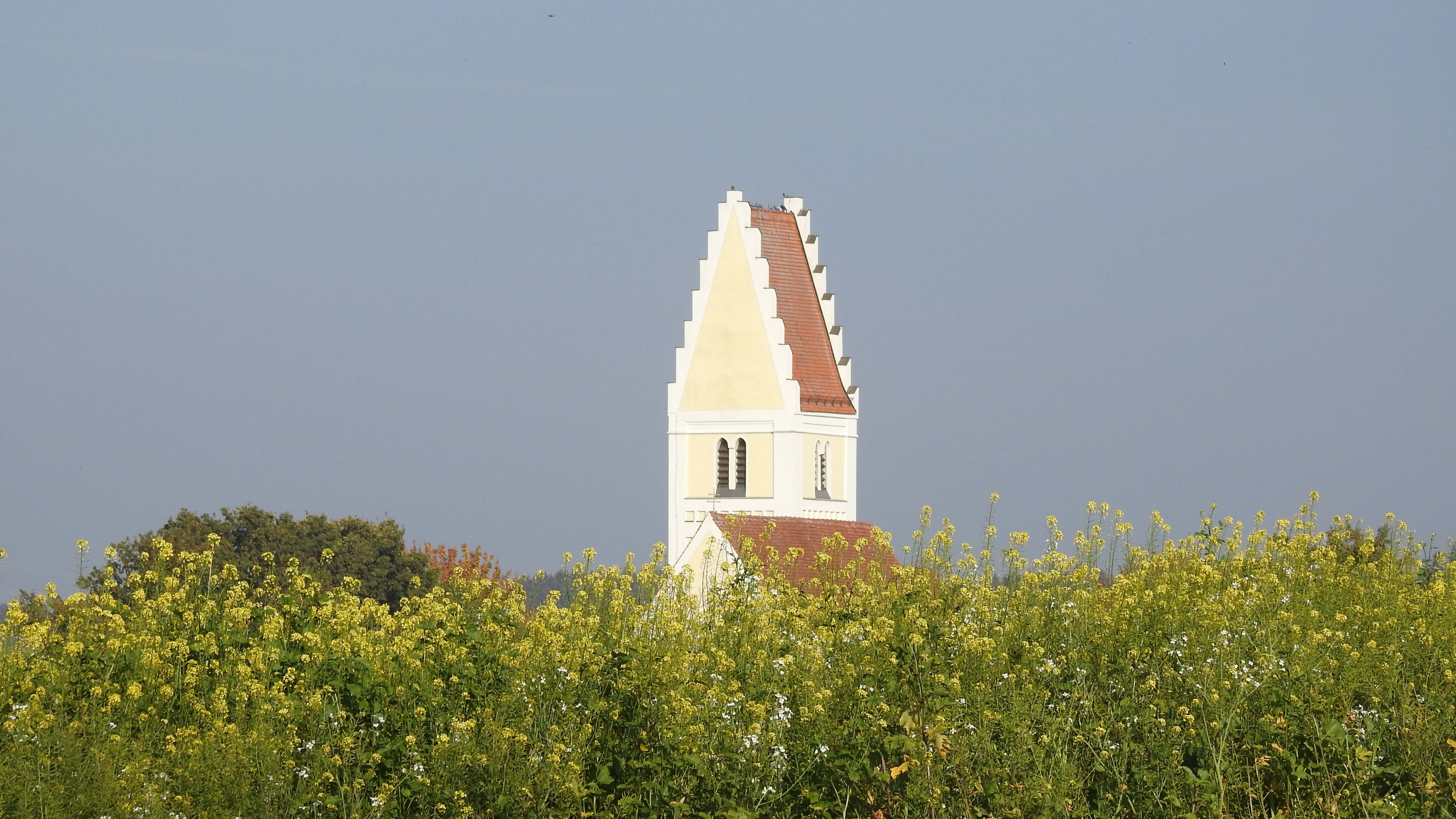 Kirche in Tödtenried, Sielenbach, von Südwesten